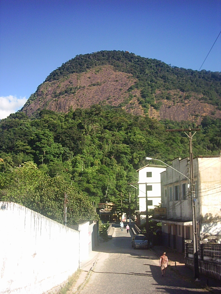 Ponte de Andorinhas